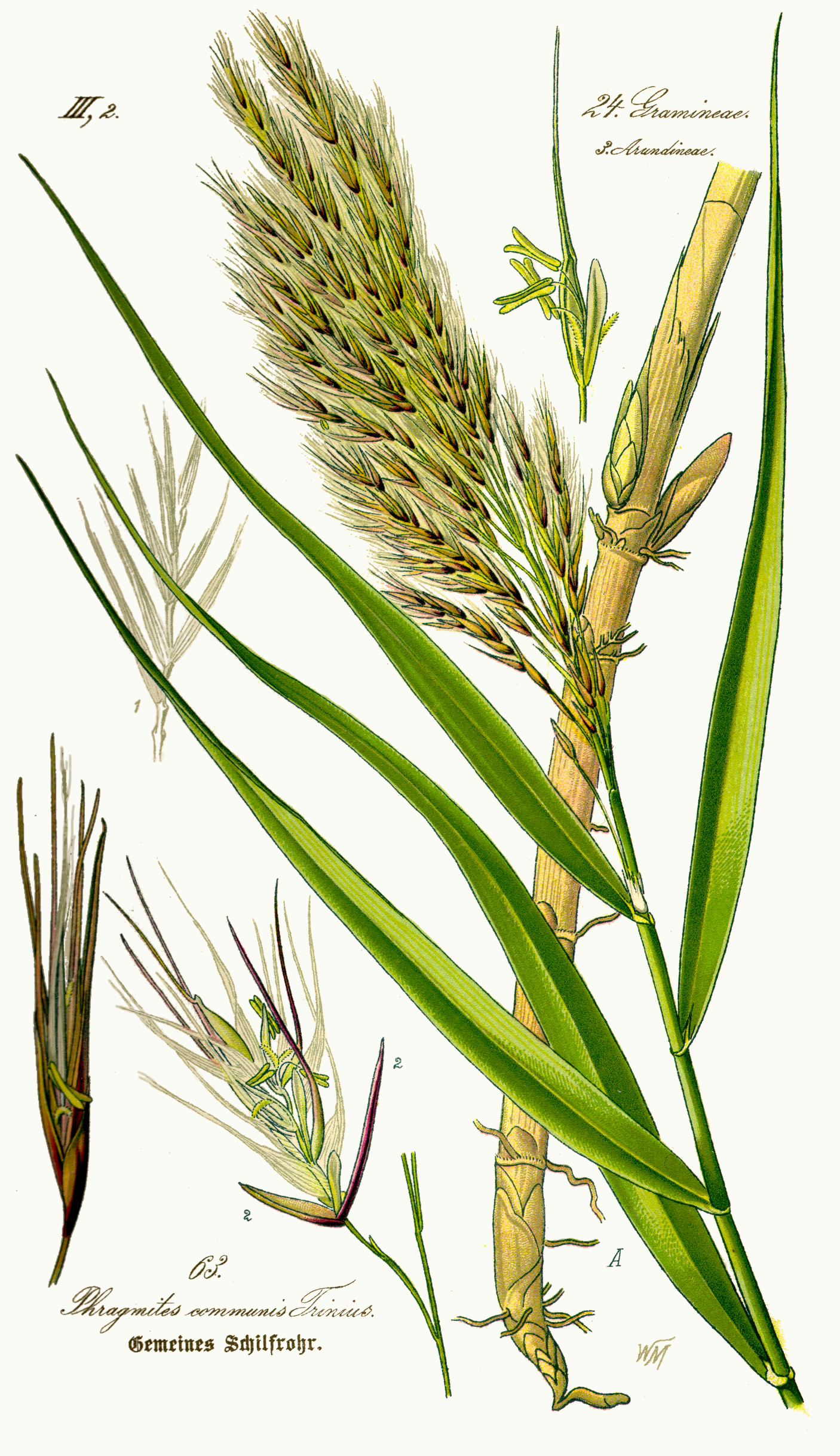 Roseau